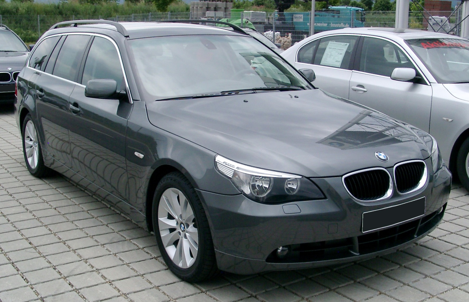 BMW E61